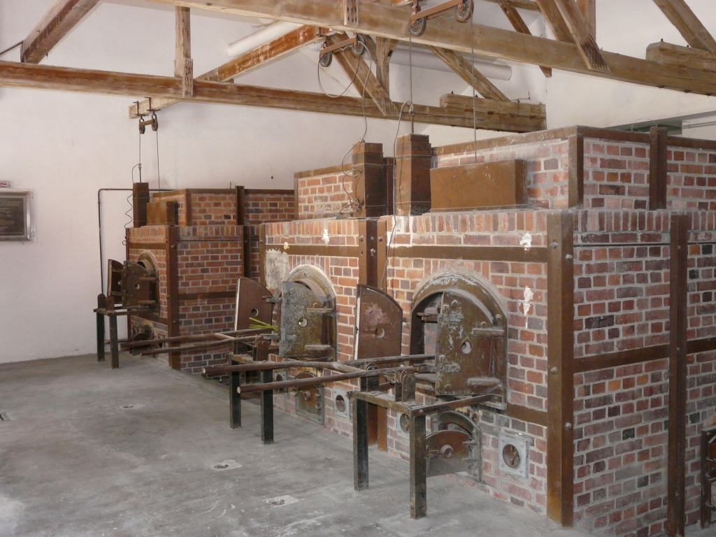 Konzentrationslager Dachau: drei von vier Verbrennungsöfen des zweiten Krematoriums in der sogenannten Baracke X aus dem Jahr 1942/43. Sie dienten als Ergänzung für die beiden Verbrennungsöfen des ersten Krematoriums.